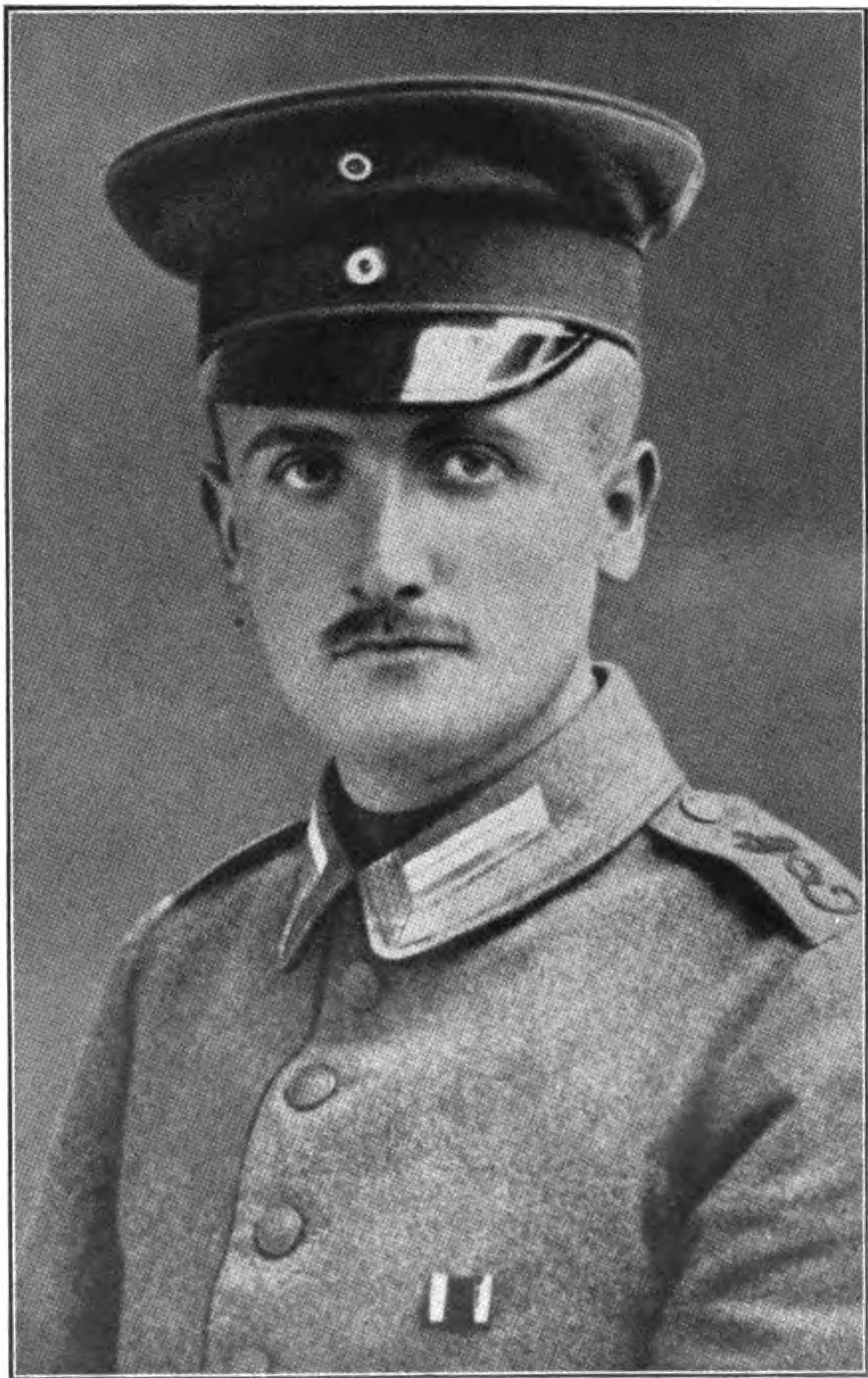 Dr. Hans Martin Strache. Unteroffizier im Königin-Elisabeth-Garde-Grenadier-Regiment Nr. 3. Inhaber des Eisernen Kreuzes.